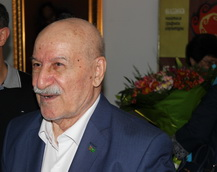 На открытии своей юбилейной персональной выставке. апрель 2016.